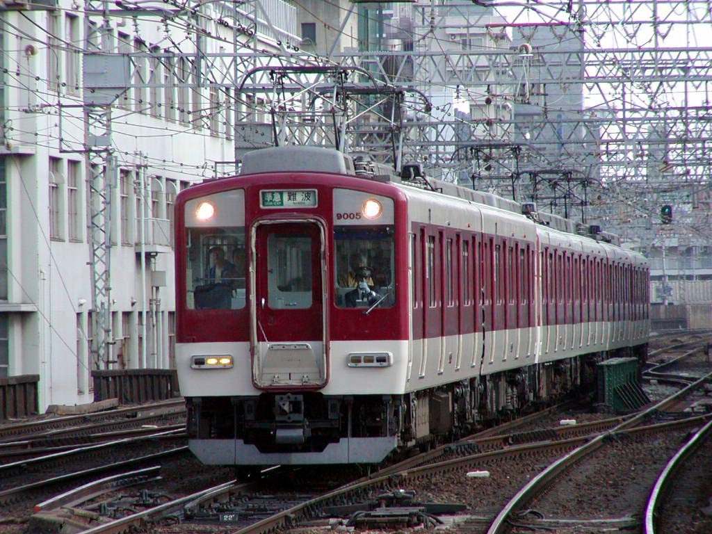 近鉄 9000系（奈良線時代のもの）